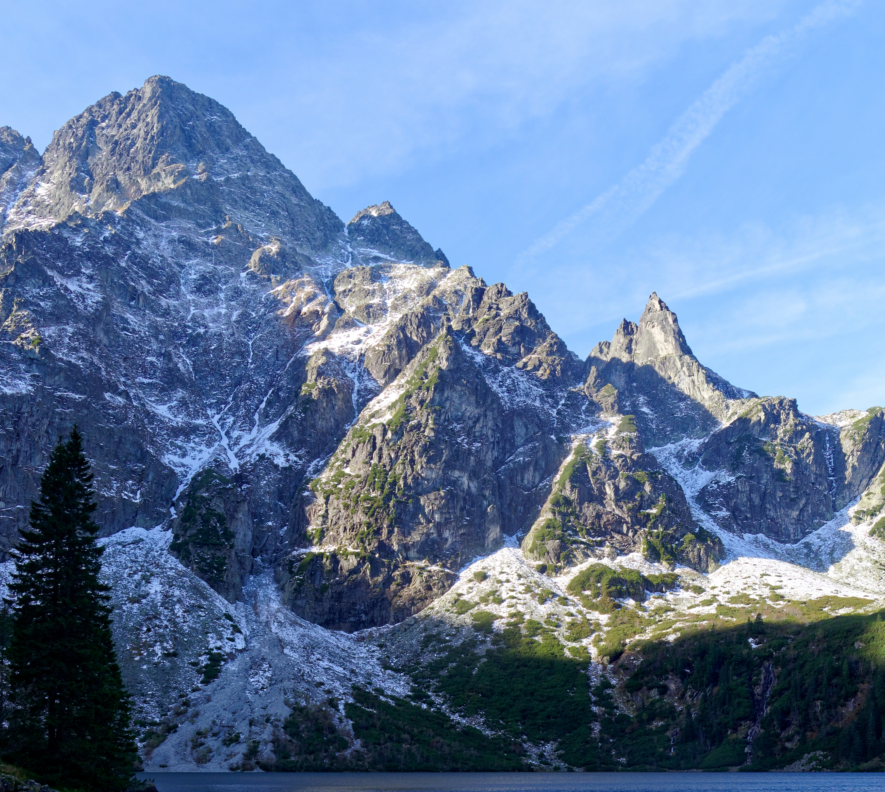 Masyw Cubryny i Wielkiego Mięguszowieckiego Szczytu